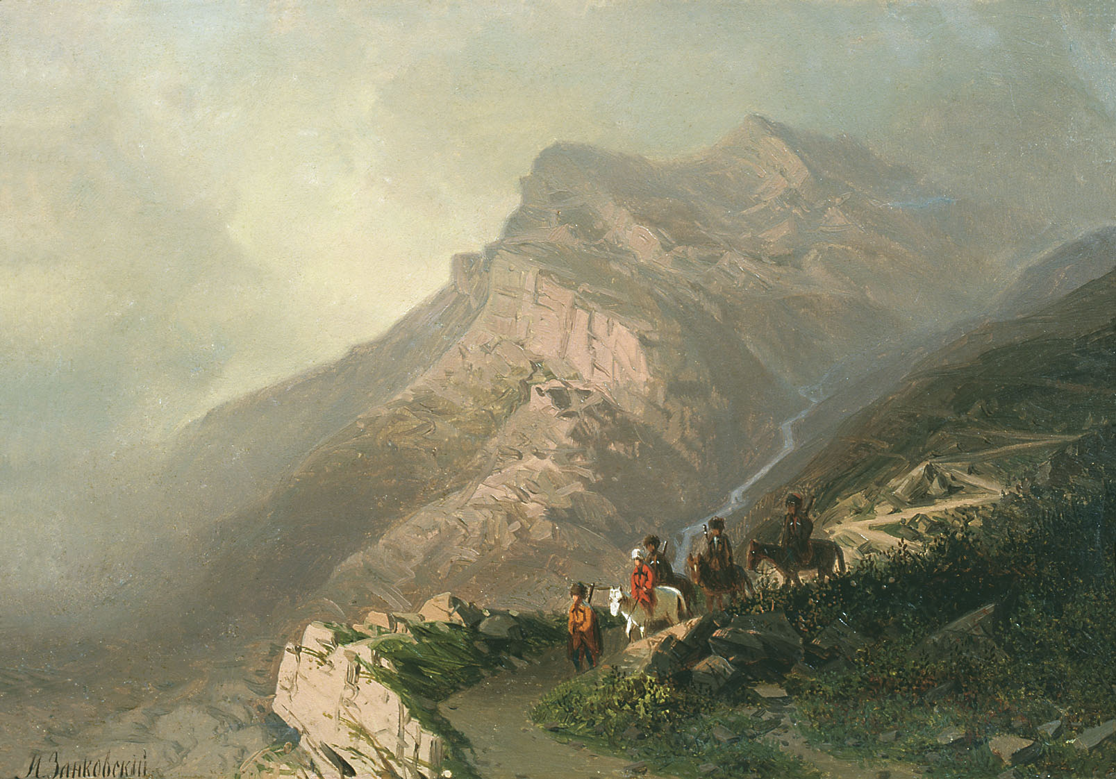 Дорога на Верхний Гуниб. Холст, масло. 24 x 34 см Дагестанский музей изобразительных искусств имени П.С. Гамзатовой